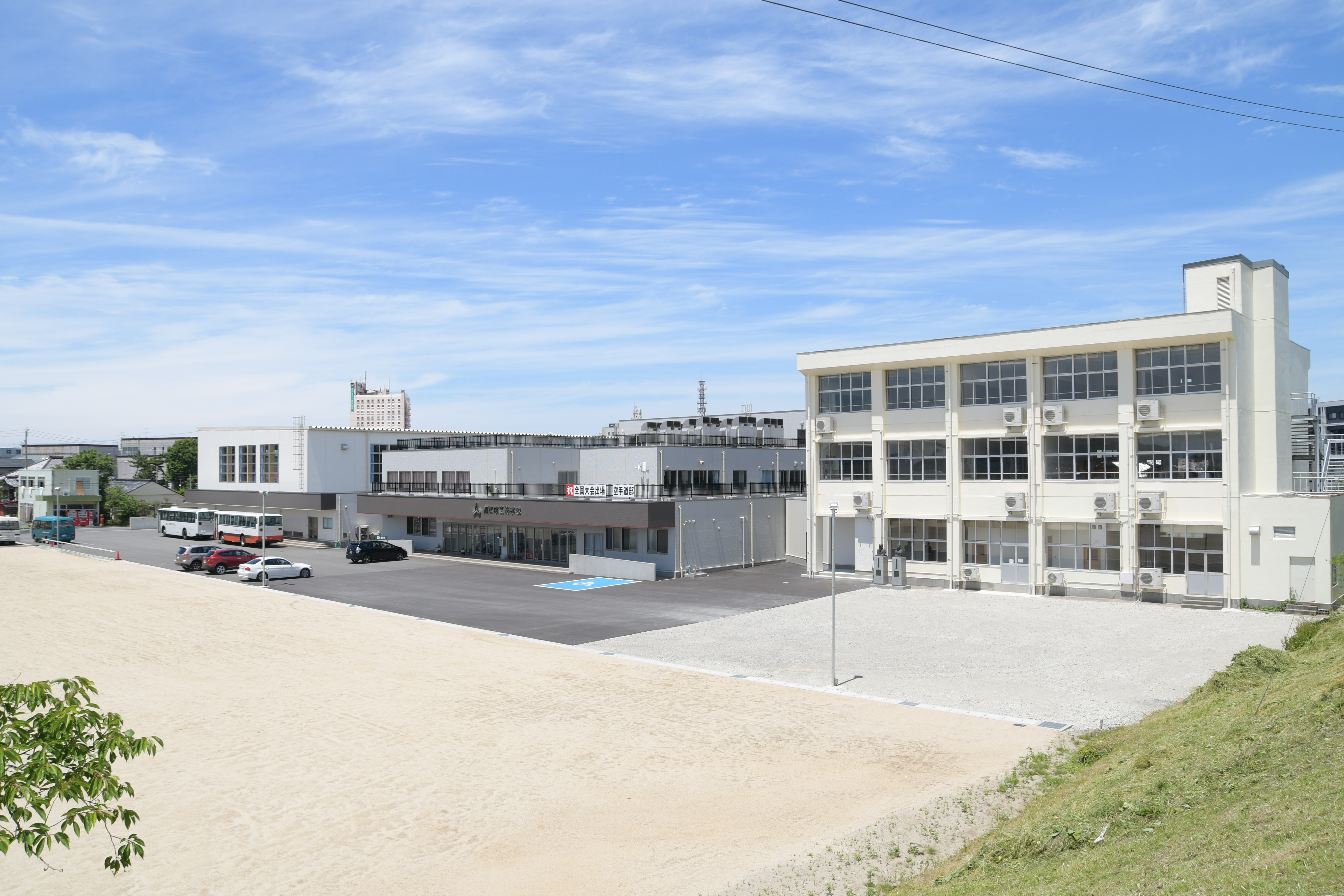 酒田南高等学校 新校舎